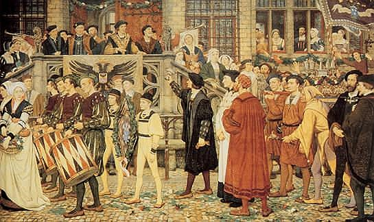 "Optocht van de rederijkerskamer «De Violieren» in 1539", door Edgard Farasyn (1858-1938); murale schilderij in de trapzaal van het stadhuis, Antwerpen, België